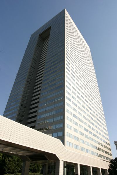 Toshiba Headquarter in Tokyo, Japan